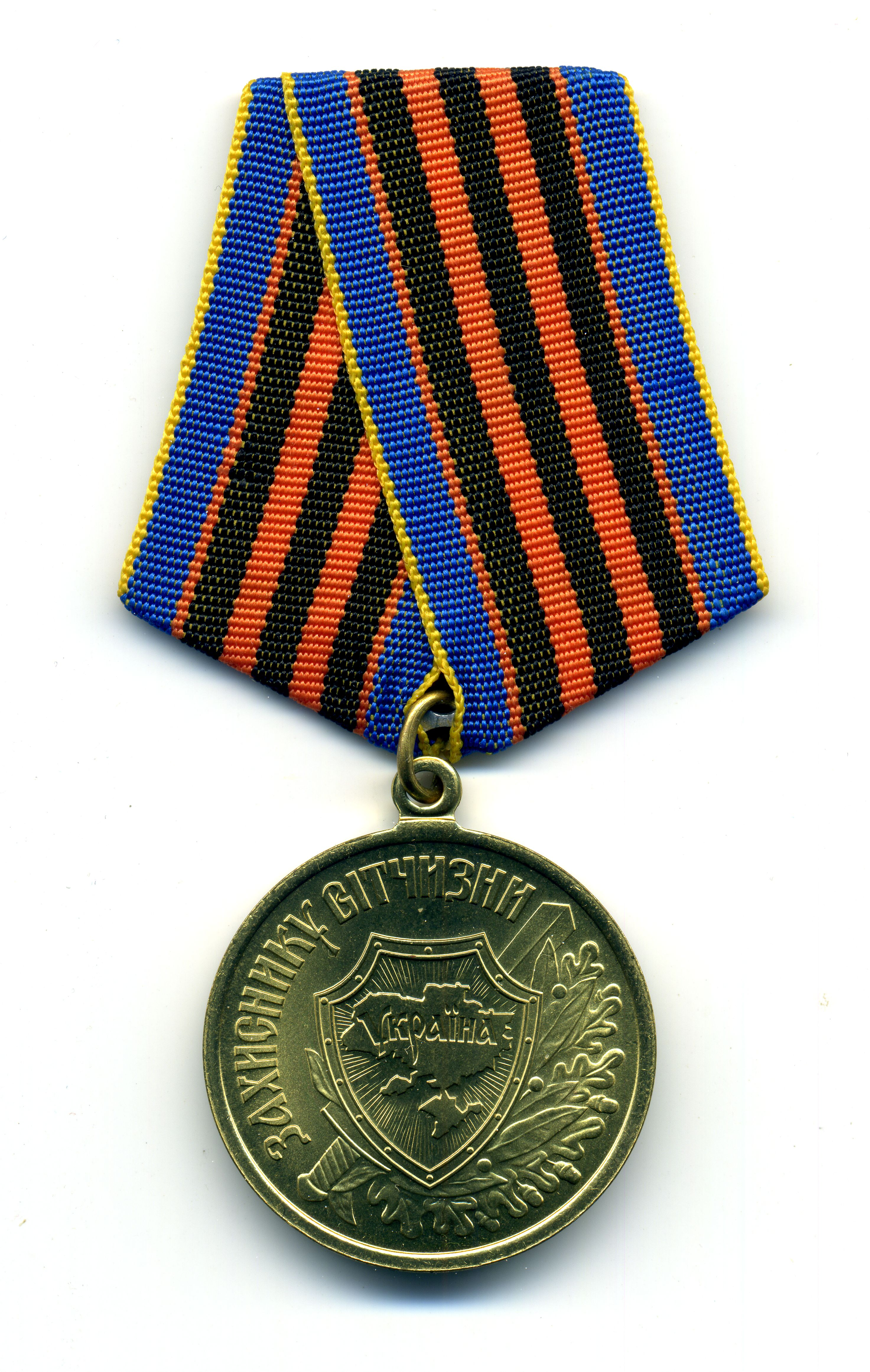 Медаль Украины «Защитнику Отчизны»